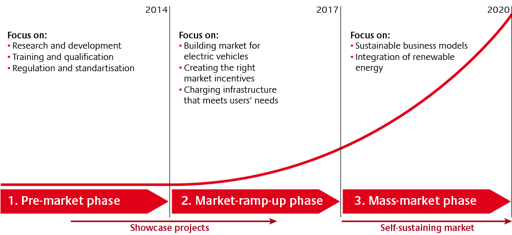 Phasenmodell der NPE